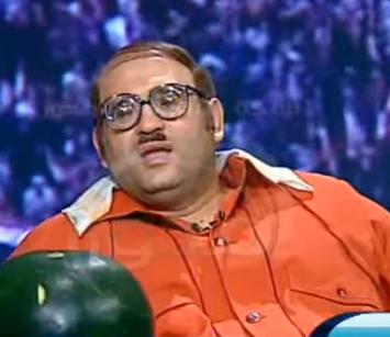 أكرم حسني كشخصية "سيد أبو حفيظة" في لقاء خاص على برنامج "دقيقة" التابع لقناة المحور الفضائية